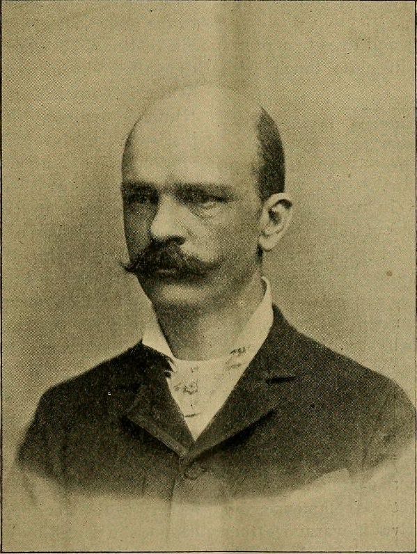 Robert W. Shufeldt (1850-1934)